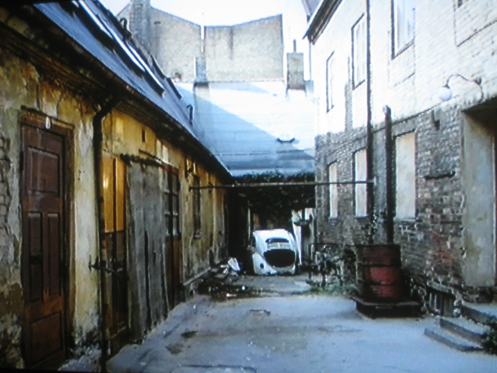 Houses in kv Carolus, Malmö, 1968.